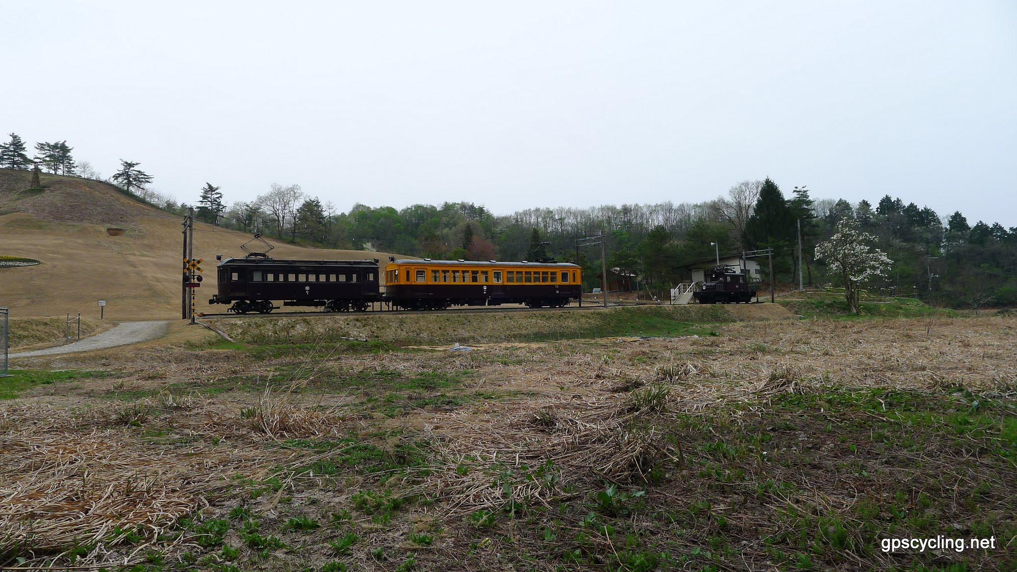 冬鳥越スキーガーデン